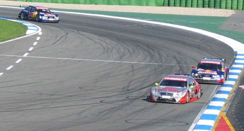 DTM